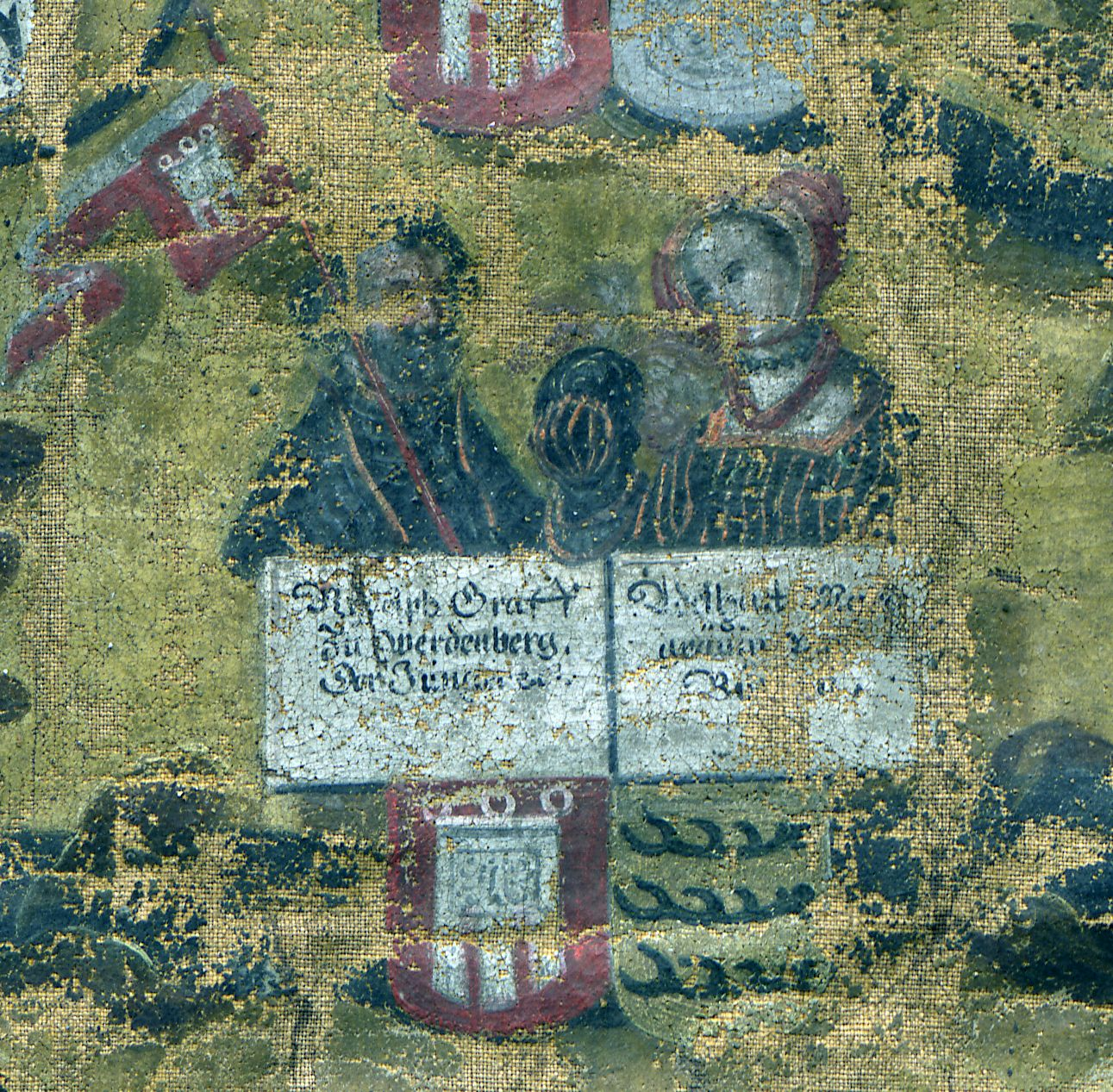 Graf Rudolf II. v. Werdenberg-Sargans († um 1322) stammte aus einer Seitenlinie der Grafen Montfort. Ihm gelang es, seinen Besitz durch die Heirat mit der Erbtochter Adelheid v. Burgau zu vergrößern. Er erhielt 1289 die Herrschaft Alpeck, später erwarb er Schmalegg sowie die Vogtei über das Kloster Pfäfers.